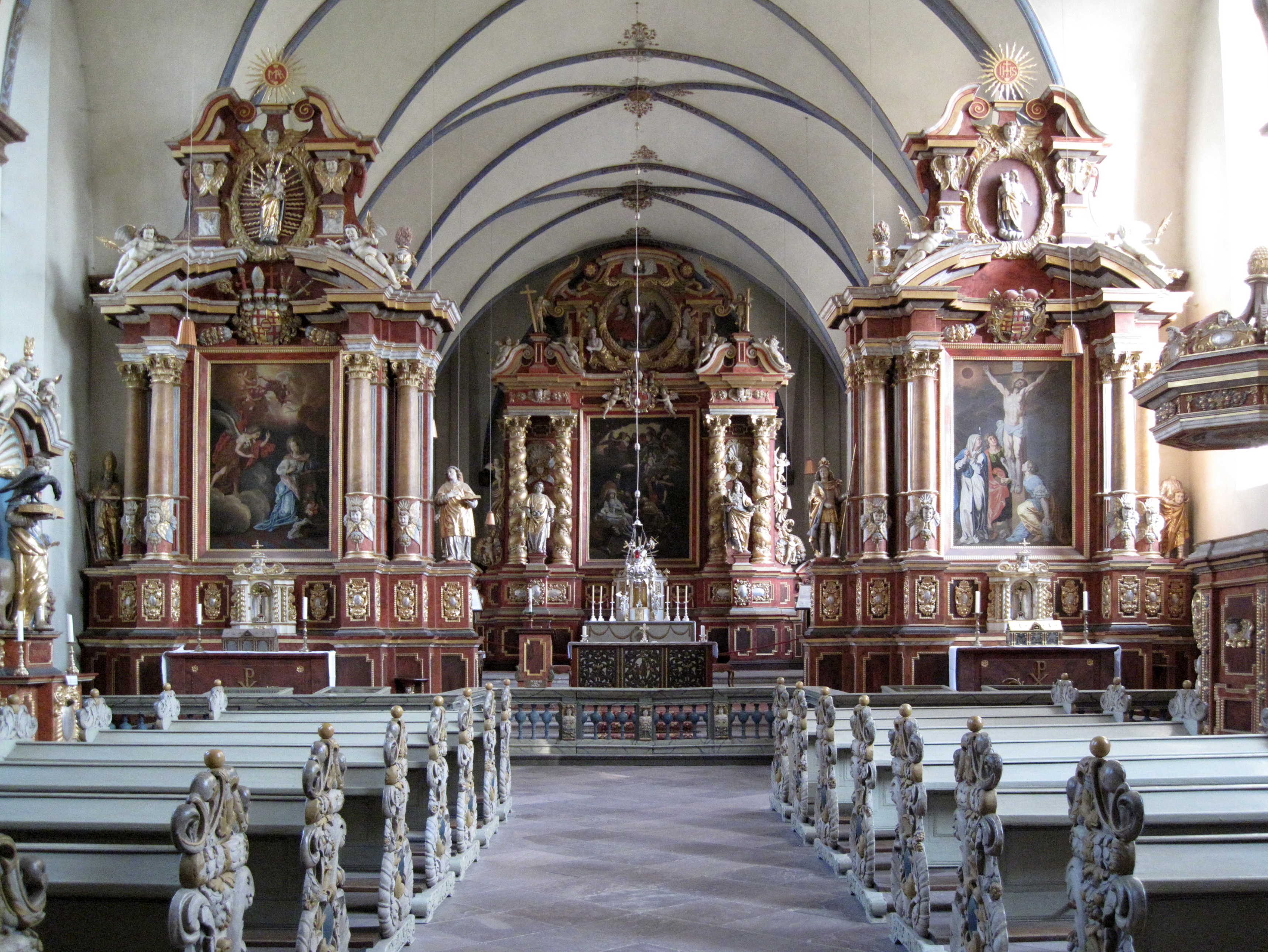 Kirche St. Stephanus und Vitus, Blick vom Eingang auf den Altar, Corvey, Höxter, Nordrhein - Westfalen, Deutschland This is a photograph of an architectural monument.